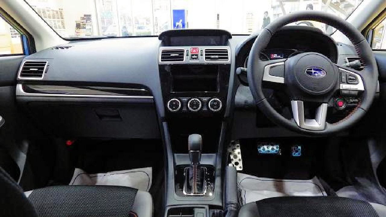 スバル XV 2.0i-L EyeSight